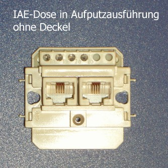 IAE-Dose in Aufputzausführung ohne Deckel